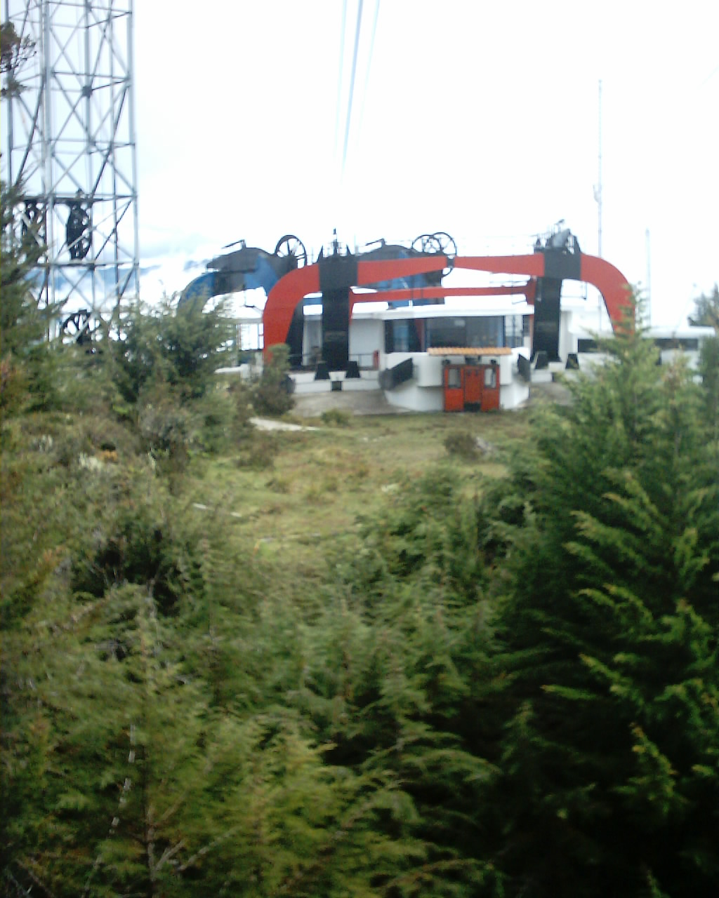 Esta foto fue tomada por Venex en el año 2005. Estación La Aguada del teleférico de Mérida, en Venezuela.